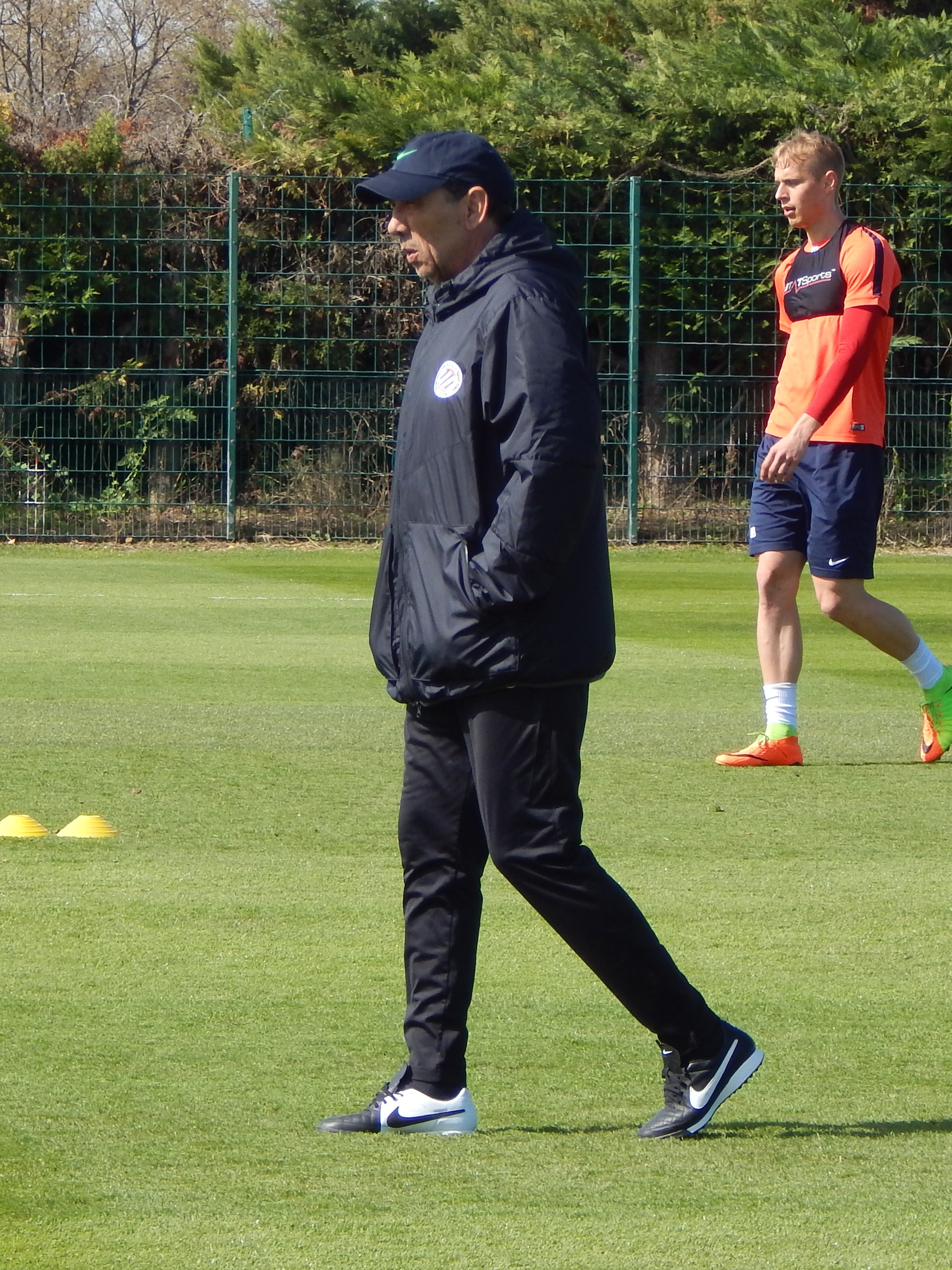 Jean Louis Gasset (MHSC), février 2017.